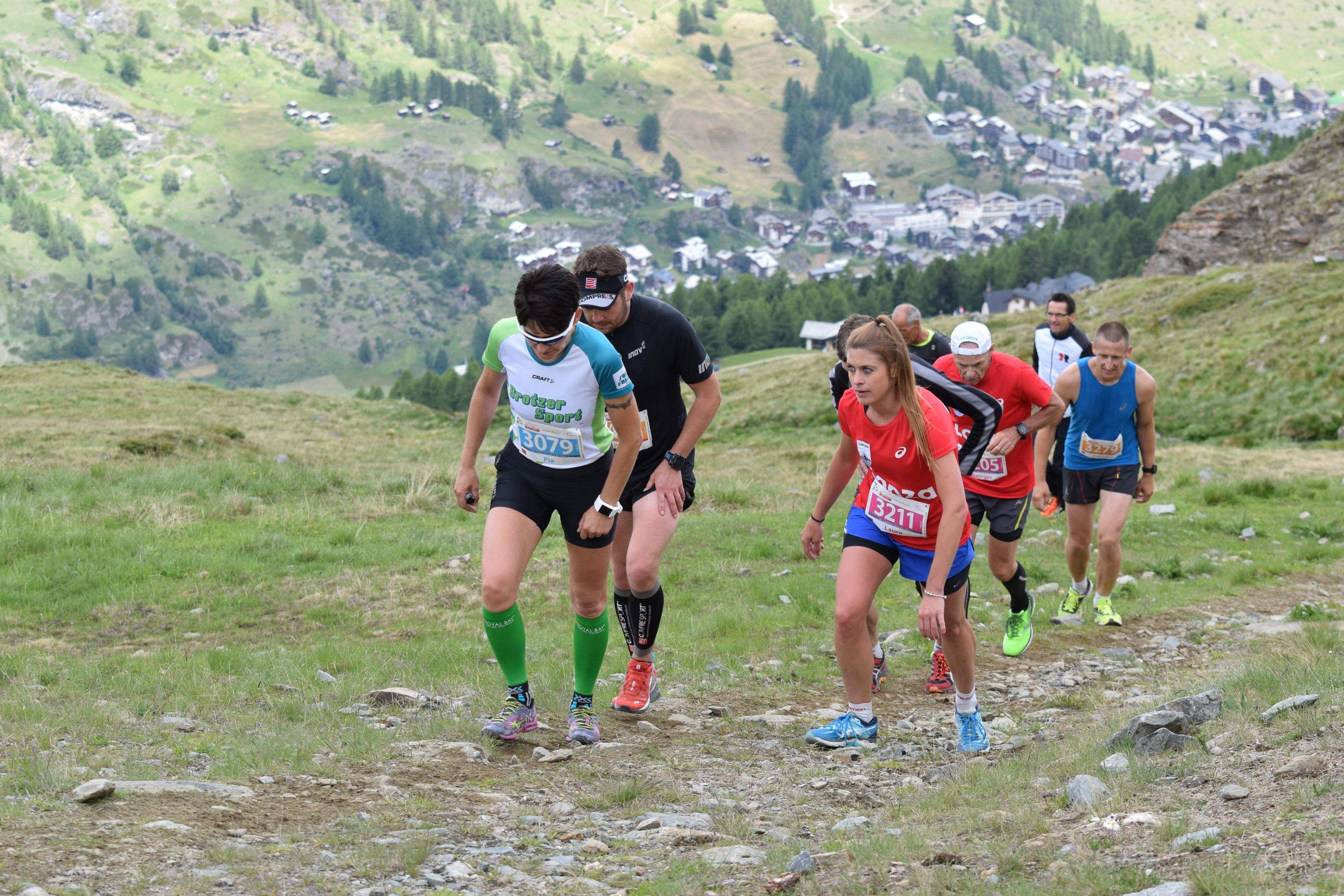 Arrivée du marathon de Zermatt 2017 à Riffelberg